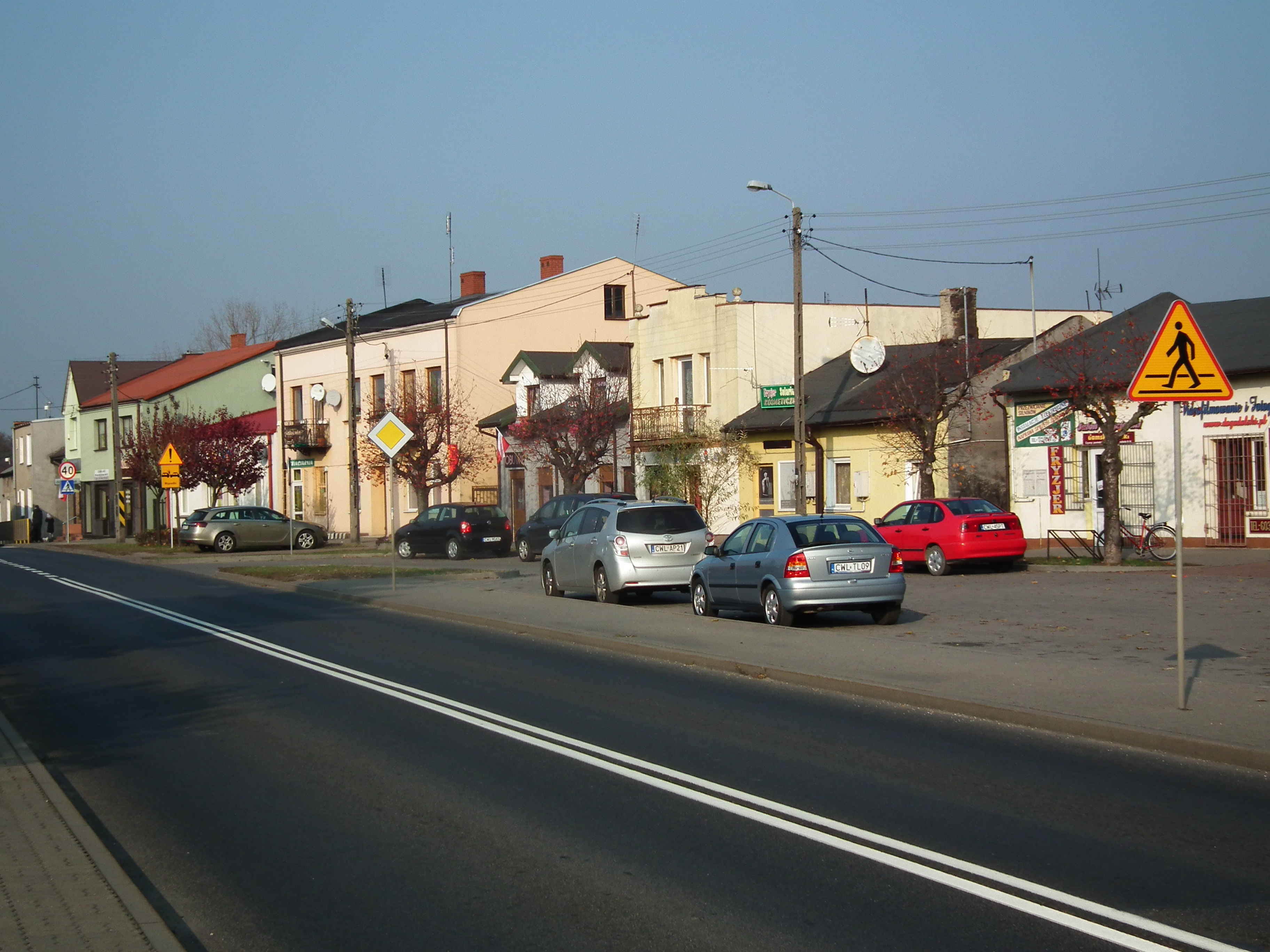 Rynek w Lubieniu Kujawskim.